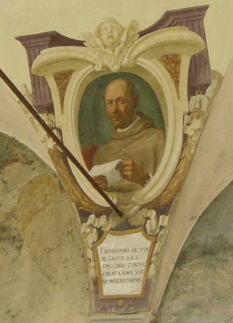 Chiostro di ognissanti, personalità francescane 18 bartrando di torre gallo